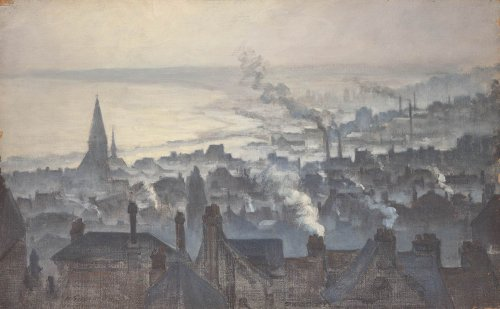 Huile sur toile - 30 x 48 cm Honfleur, Musée Eugène Boudin